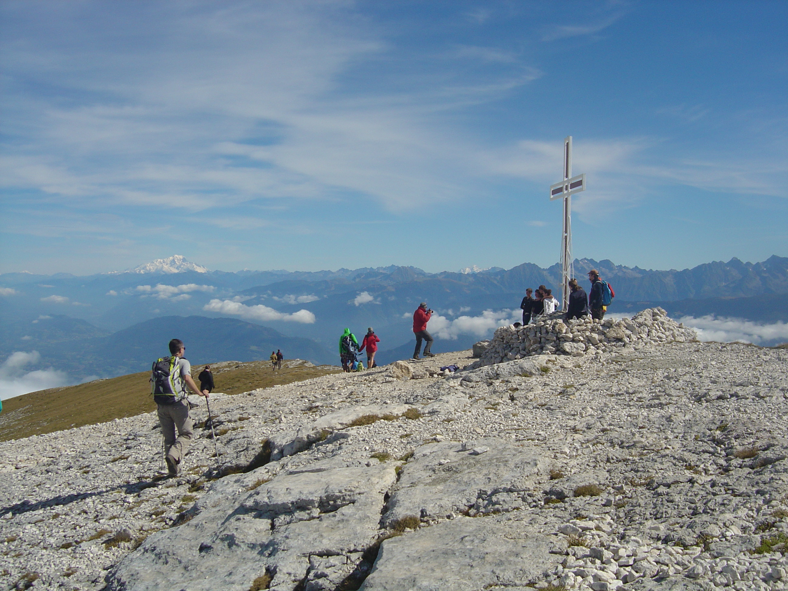 Croix au sommet de la Dent de Crolles (2062m) Mont Blanc (4808m) visible à gauche